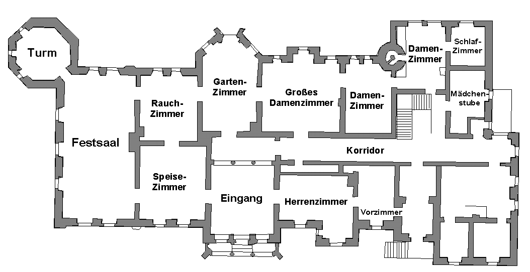 Kartlow Landkreis Demmin - Grundriss des Schlosses Kartlow Hauptetage, Skizze nach Vorlage: Grundriss des Herrenhauses, Zeichnung aus Gebäudeinventar 1872 In: Petra Gersonde: Schloß und Park Kartlow